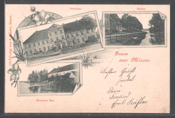 Mirow, alte Ansichtskarte